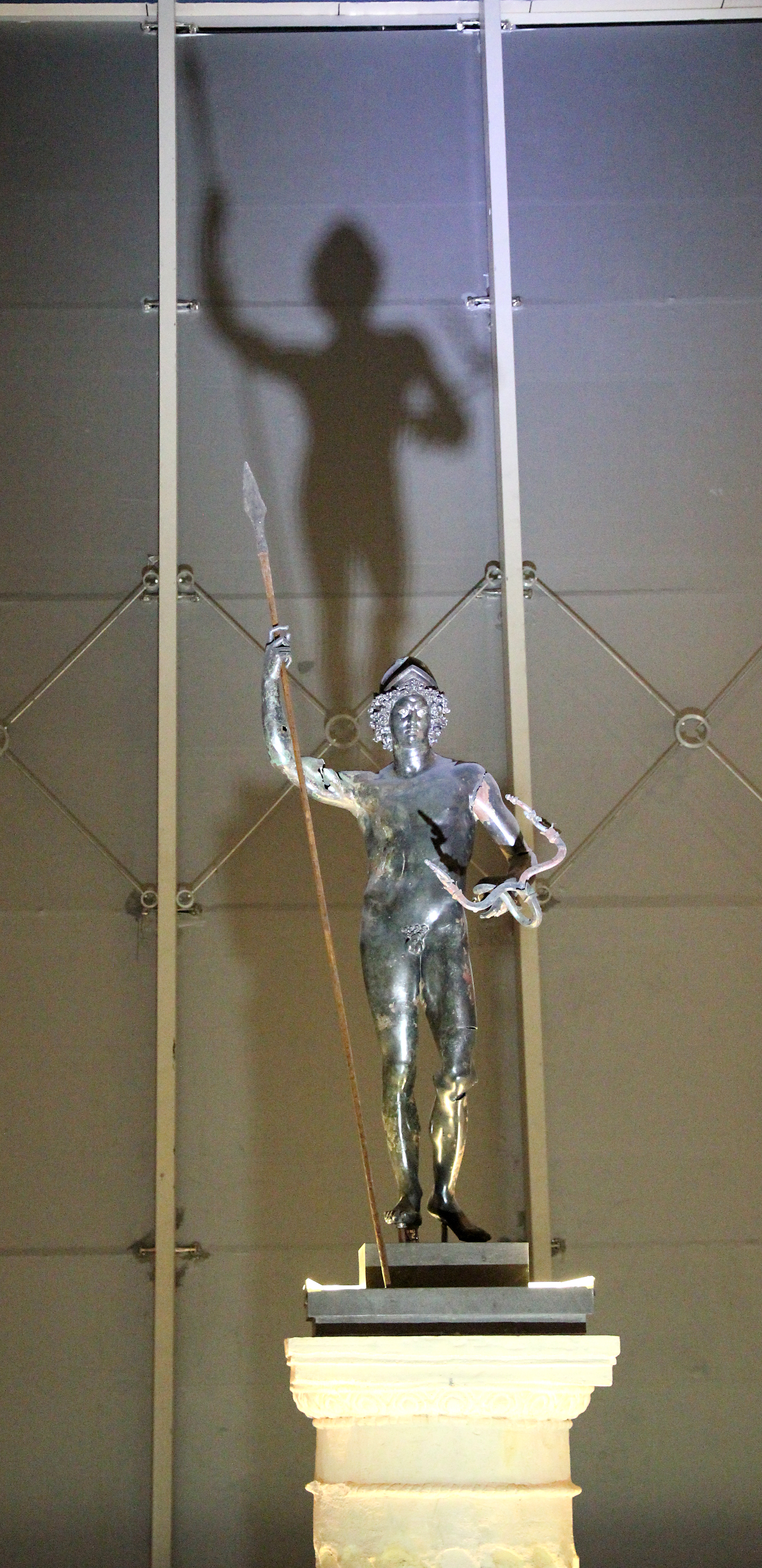 Zeugma-Mosaik-Museum, Gaziantep, Türkei, Bronzestatue des Mars aus dem "Haus des Poseidon" in Zeugma